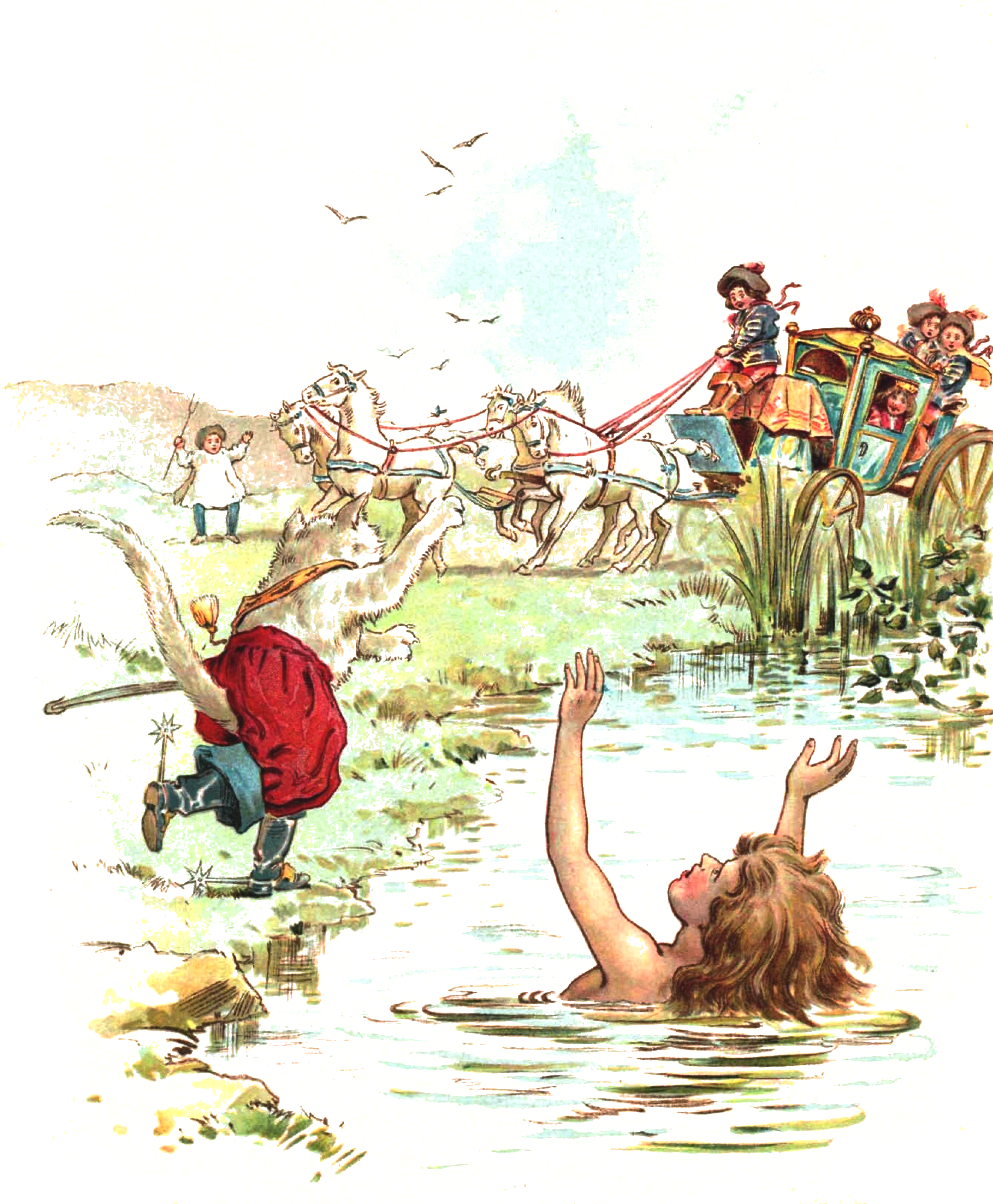 ilustracje do książki "Kot w butach" publikacja Księgarni Konstantego Trepte Warszawa 1900